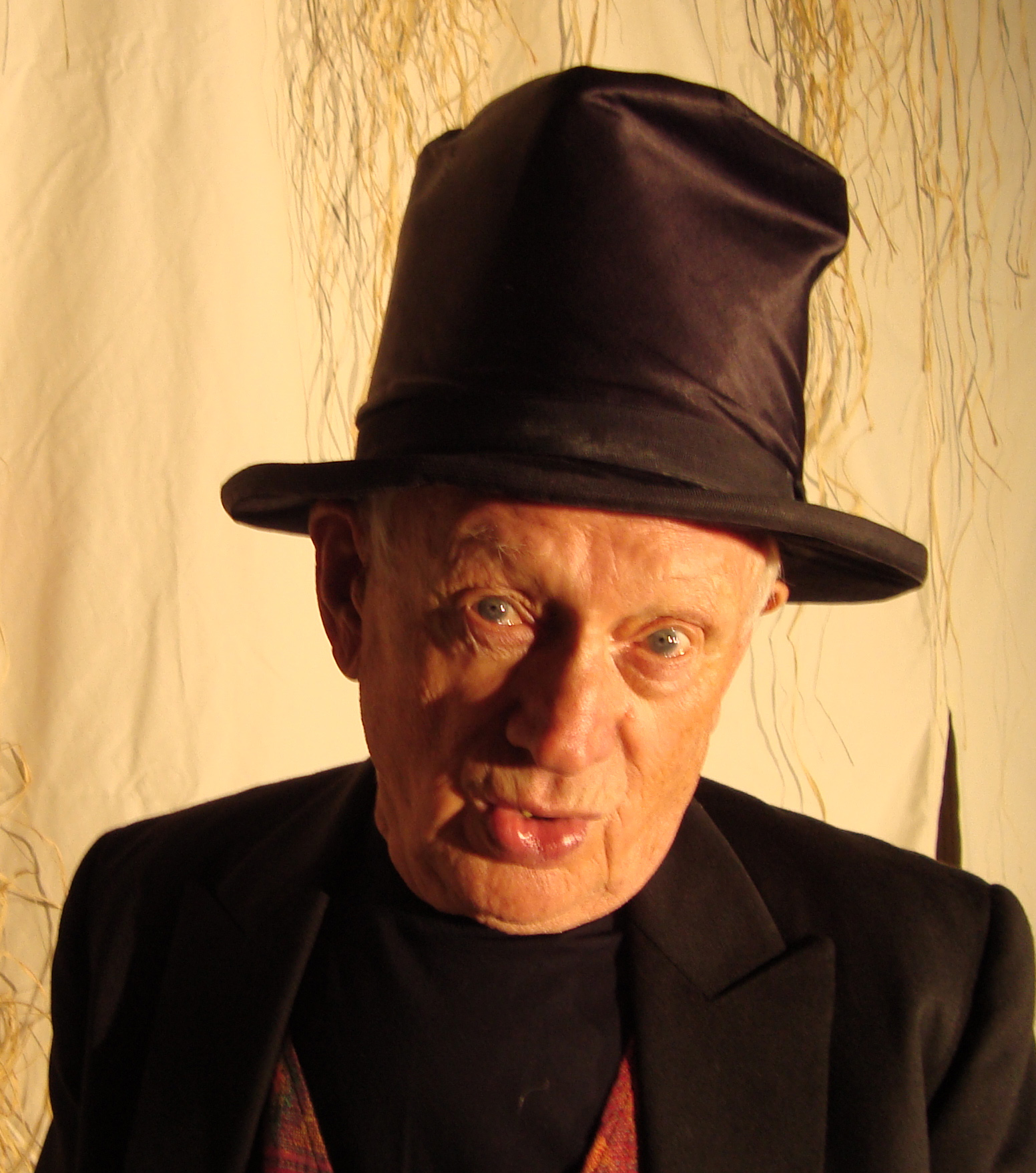 Portret Witolda Pyrkosza